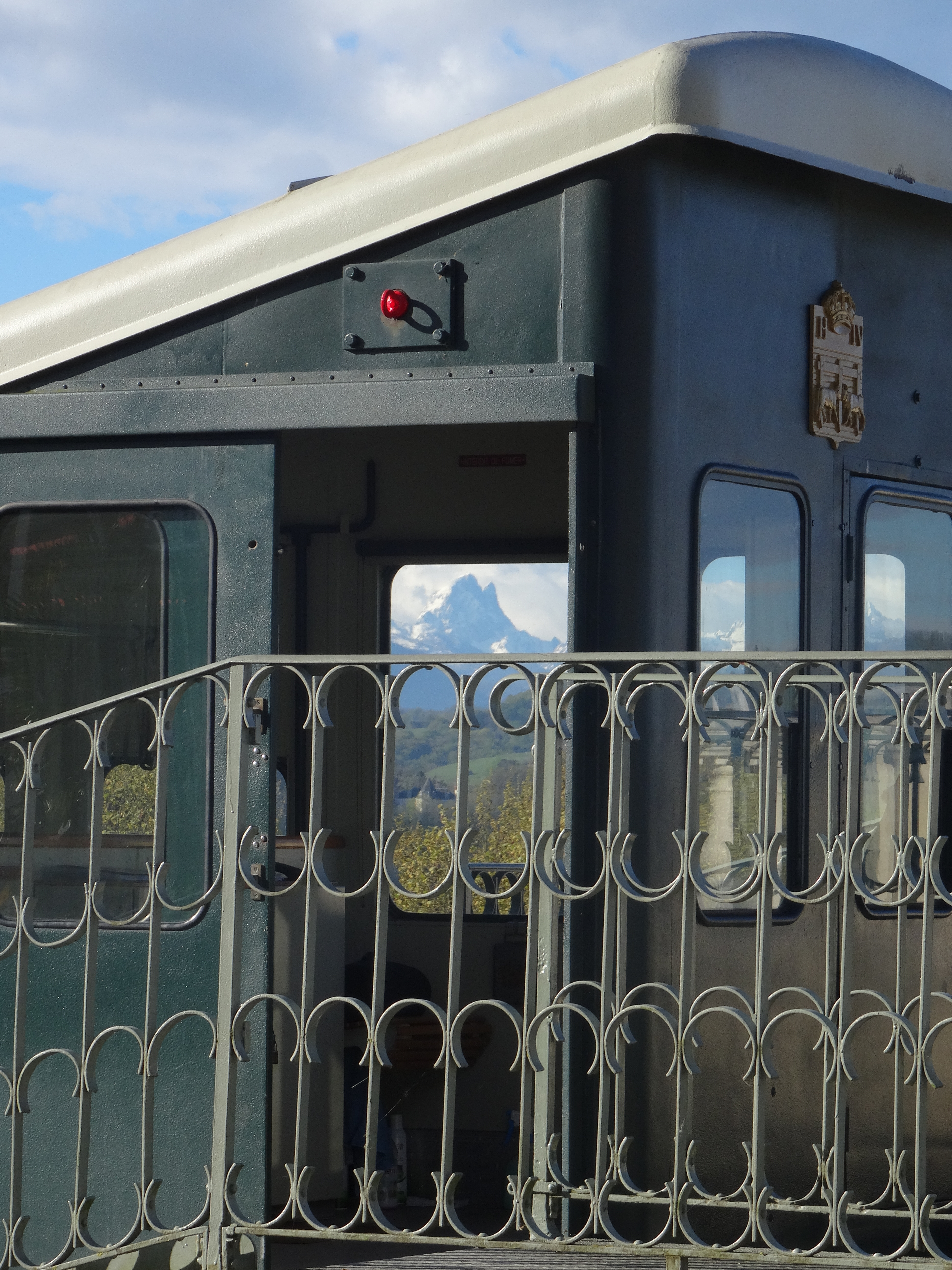 Le Pic d'Ossau vu au travers d'une fenêtre du funiculaire de Pau